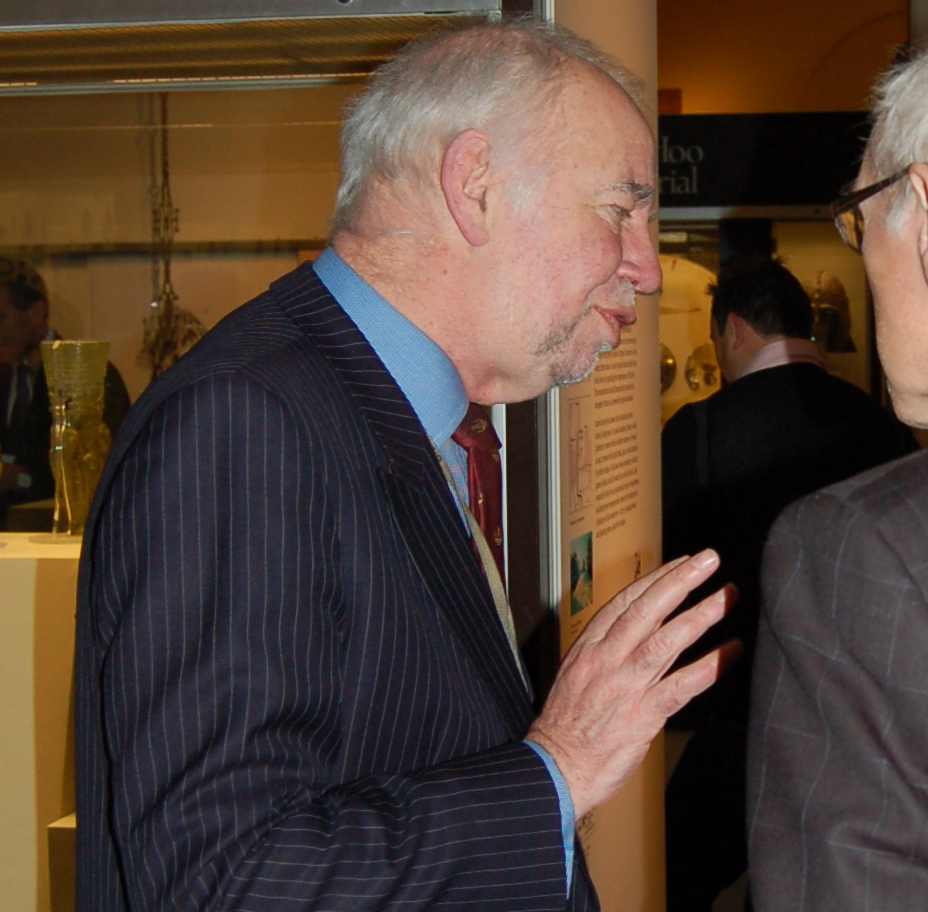 Tim Schadla-Hall